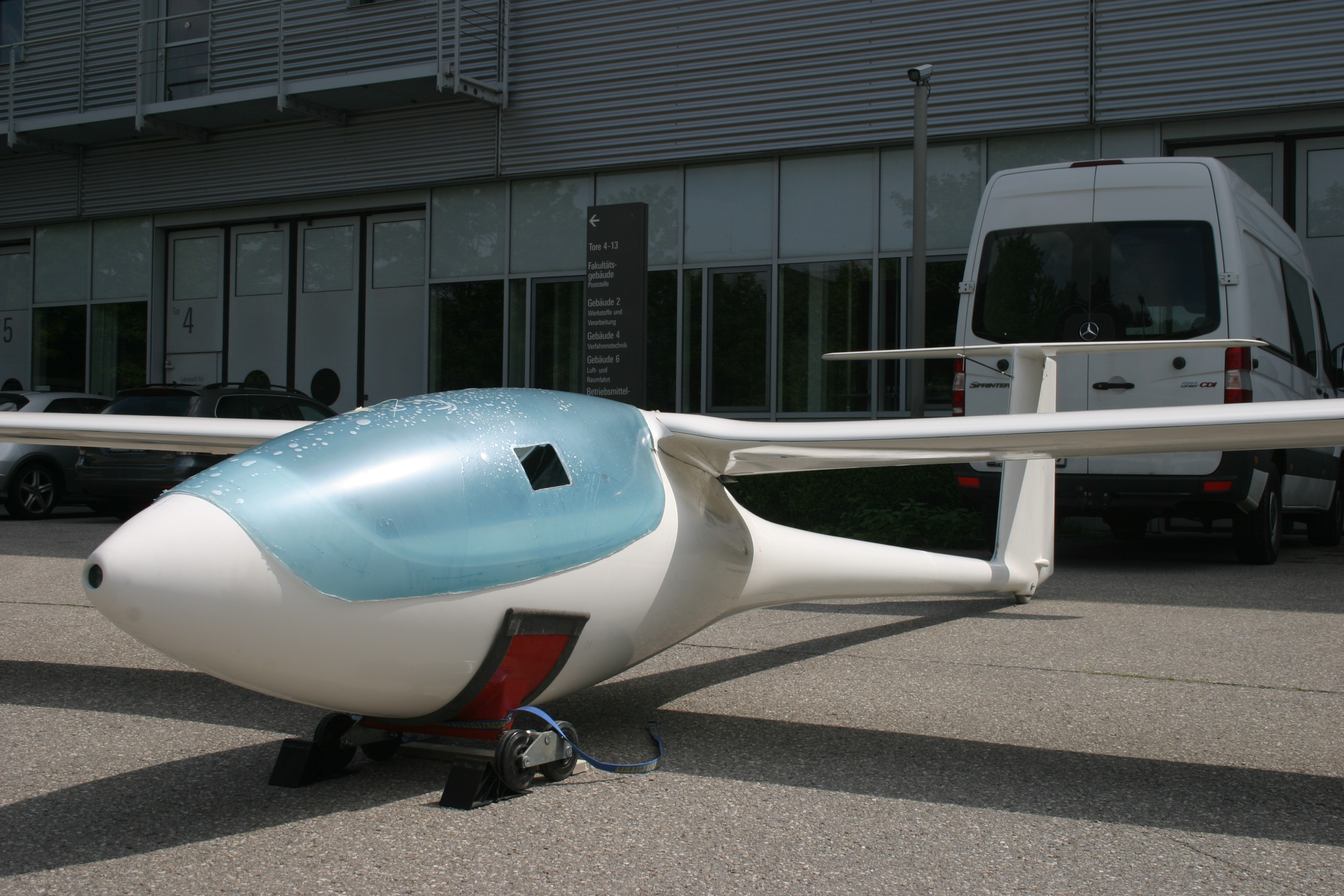 Rohbau der Akaflieg München Mü 31 mit charakteristischem Flächen-Rumpf-Übergang.